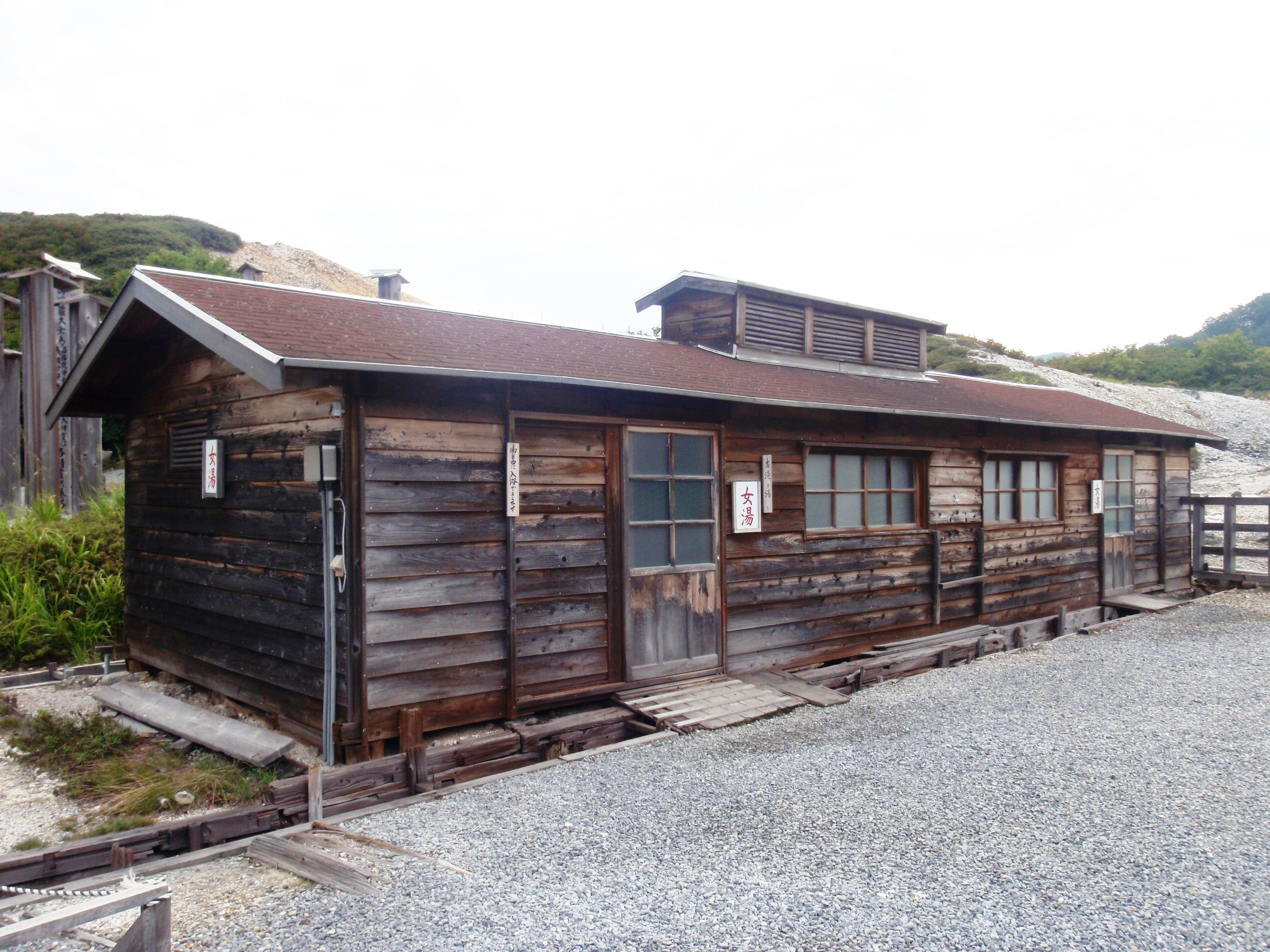 恐山温泉古滝の湯